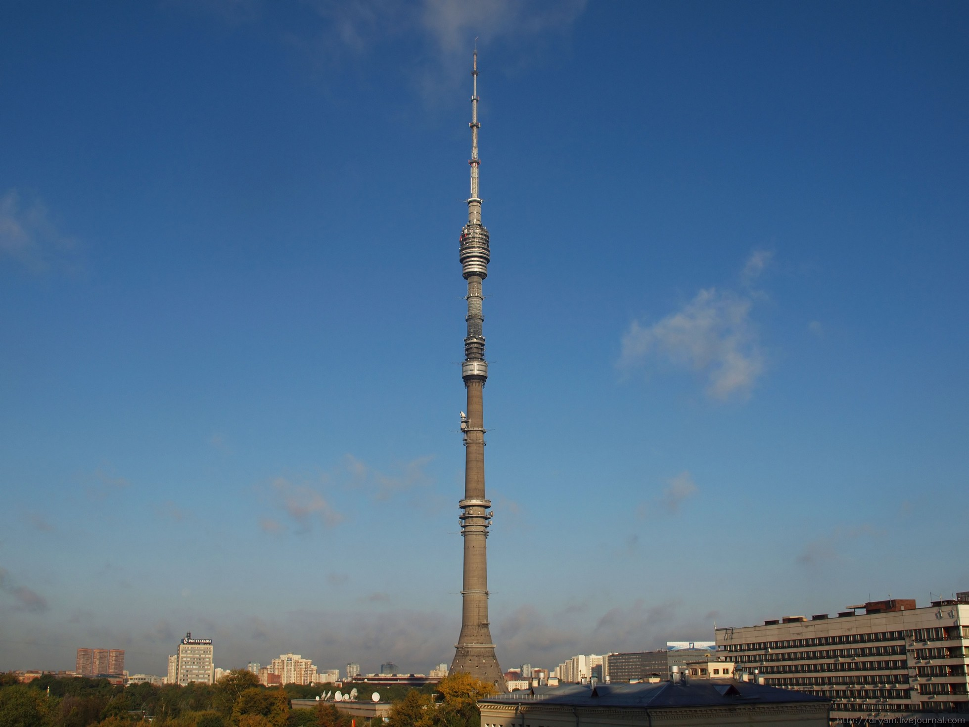 Останкинская на чистом небе